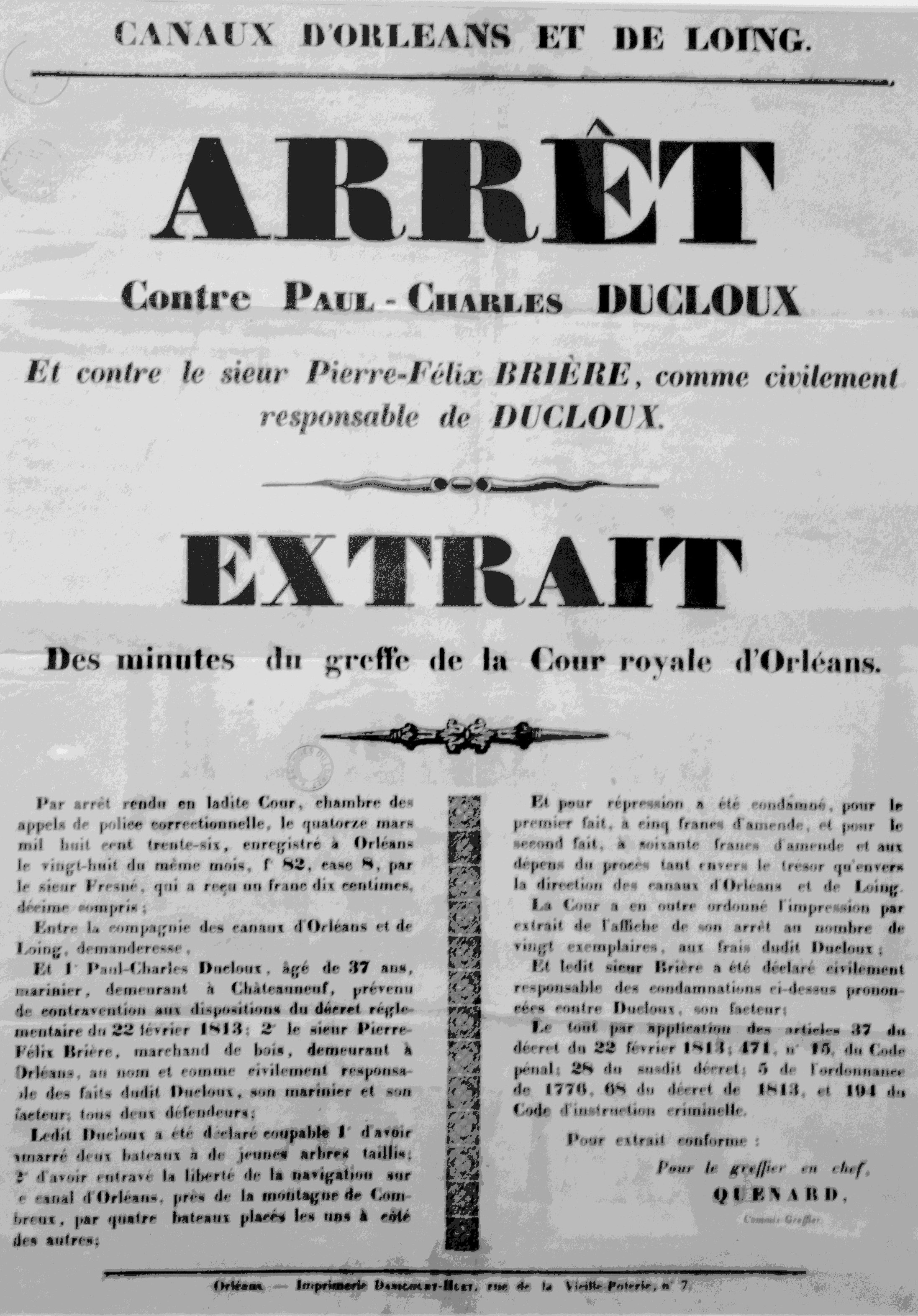 Arrêt de 1836 pris à l'encontre d'un marinier du Canal d’Orléans.